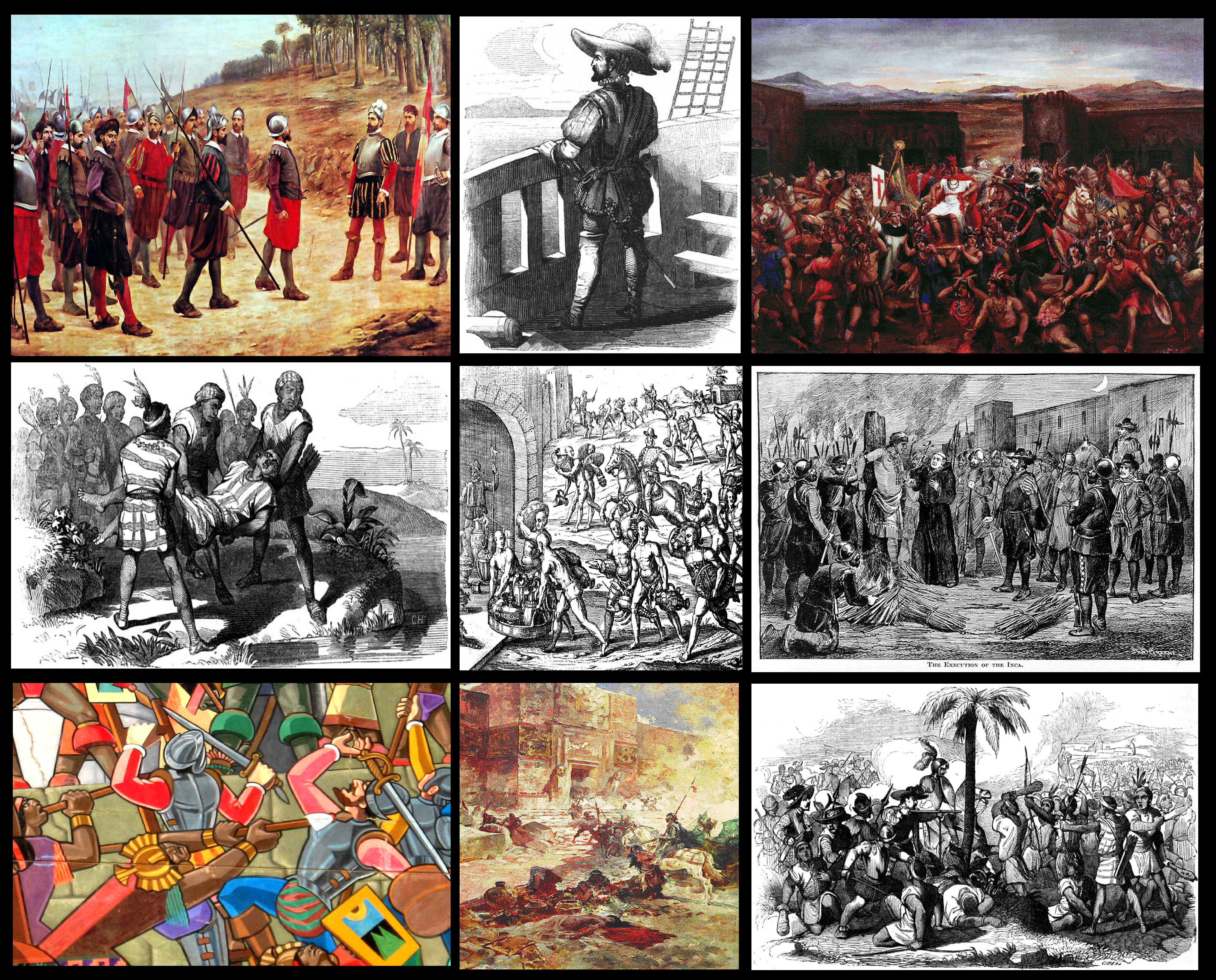 Montaje histórico de la conquista del reino del Perú